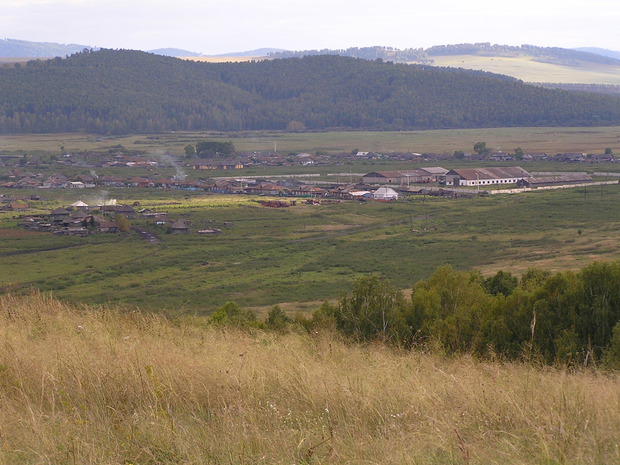 Kuraginsky District, Krasnoyarsk Krai, Russia